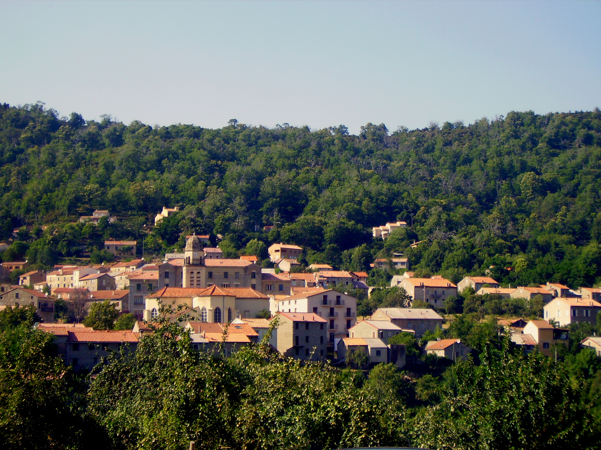 Bastelica